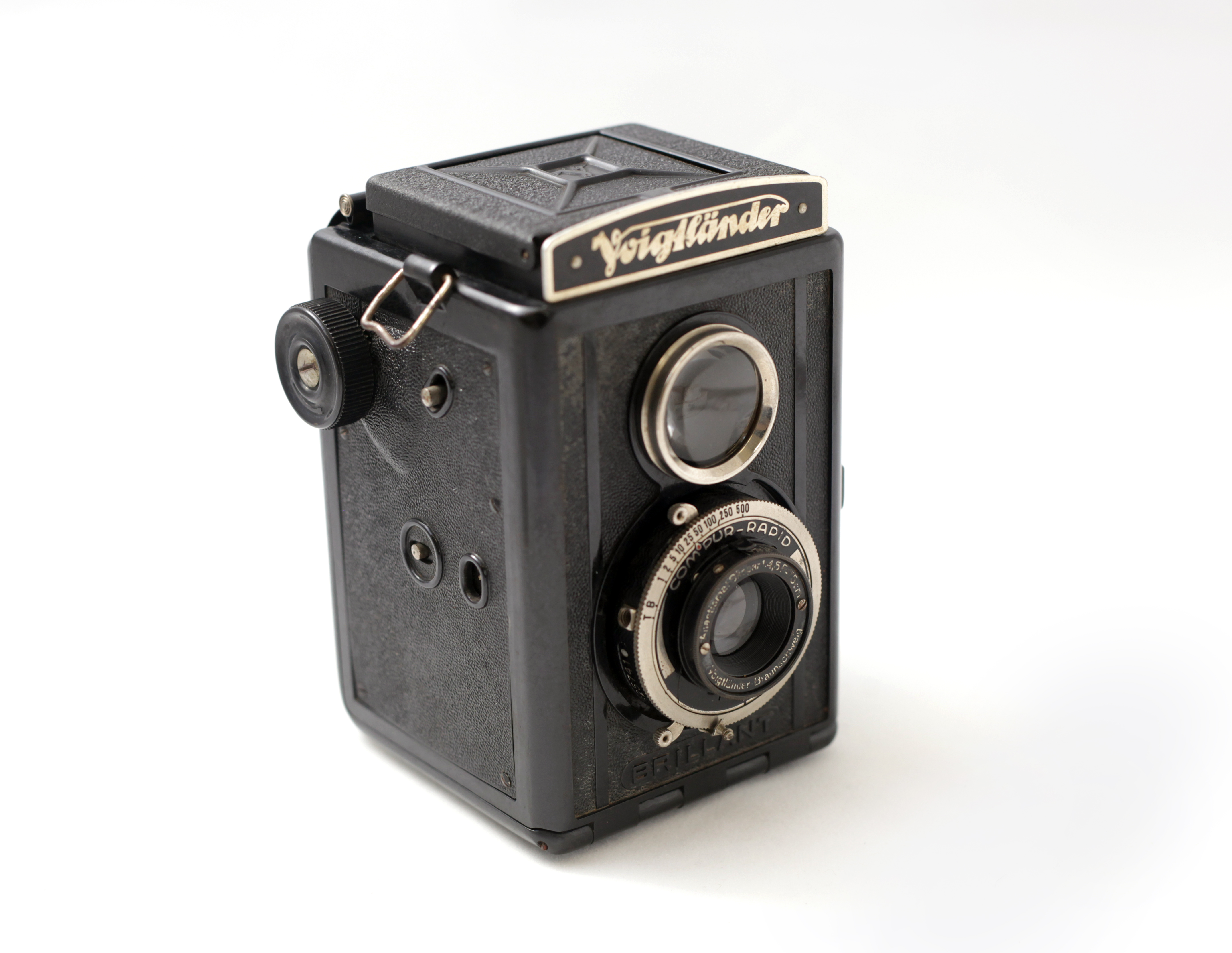 Acervo Museu da Imigração de São Paulo. Alemanha, 1945. Metal, vidro, plástico. Doador desconhecido. Máquina fotográfica provida de duas lentes circulares na parte frontal. Fabricante Voigtlander, modelo Brillant Compur Rapid.